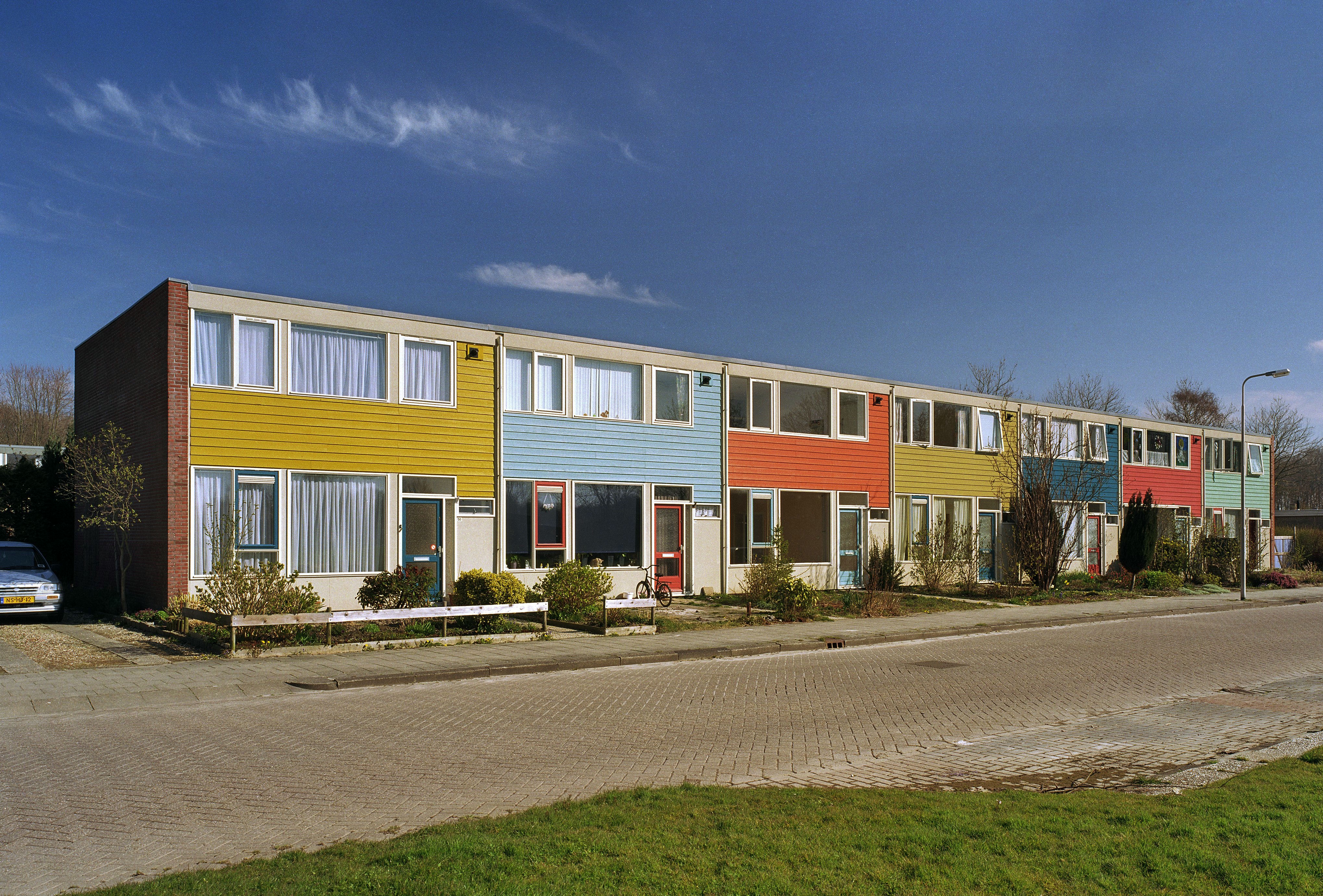 Blok huizen aan de Ring, noordzijde (opmerking: Gefotografeerd voor Toonbeelden van de wederopbouw)